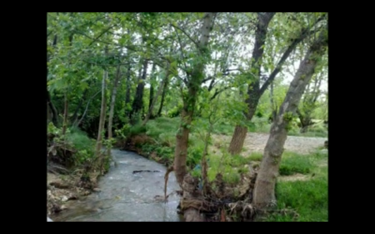 Akarsu kaynakları bakımından zengindir.